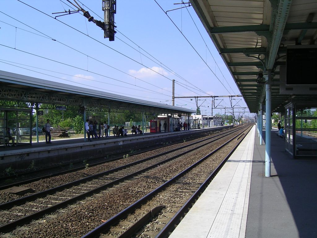 Gare et voie ferrée RER E Photo personnelle (own work) de Marianna